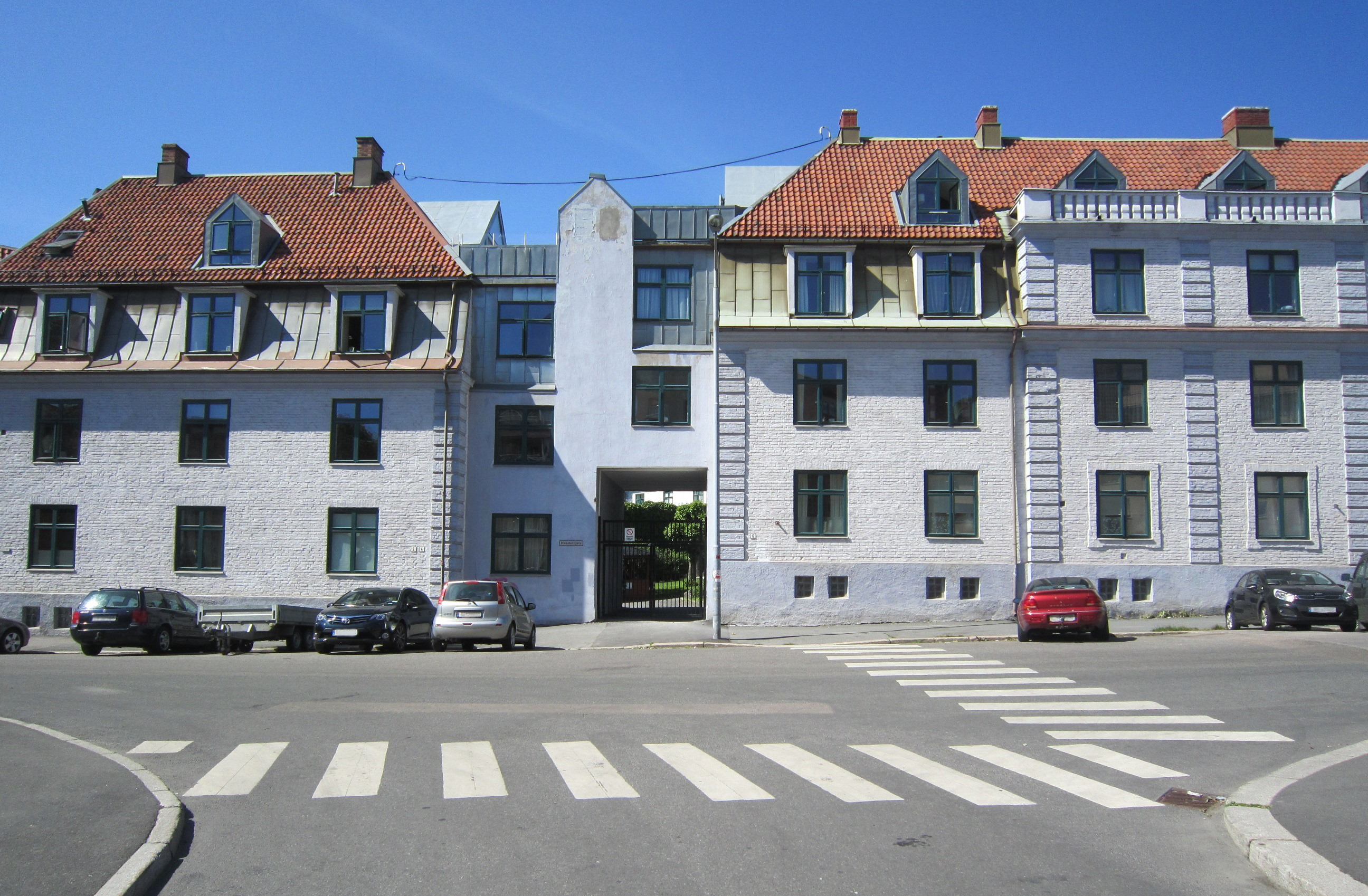 Presidentgata på Torshov i Oslo